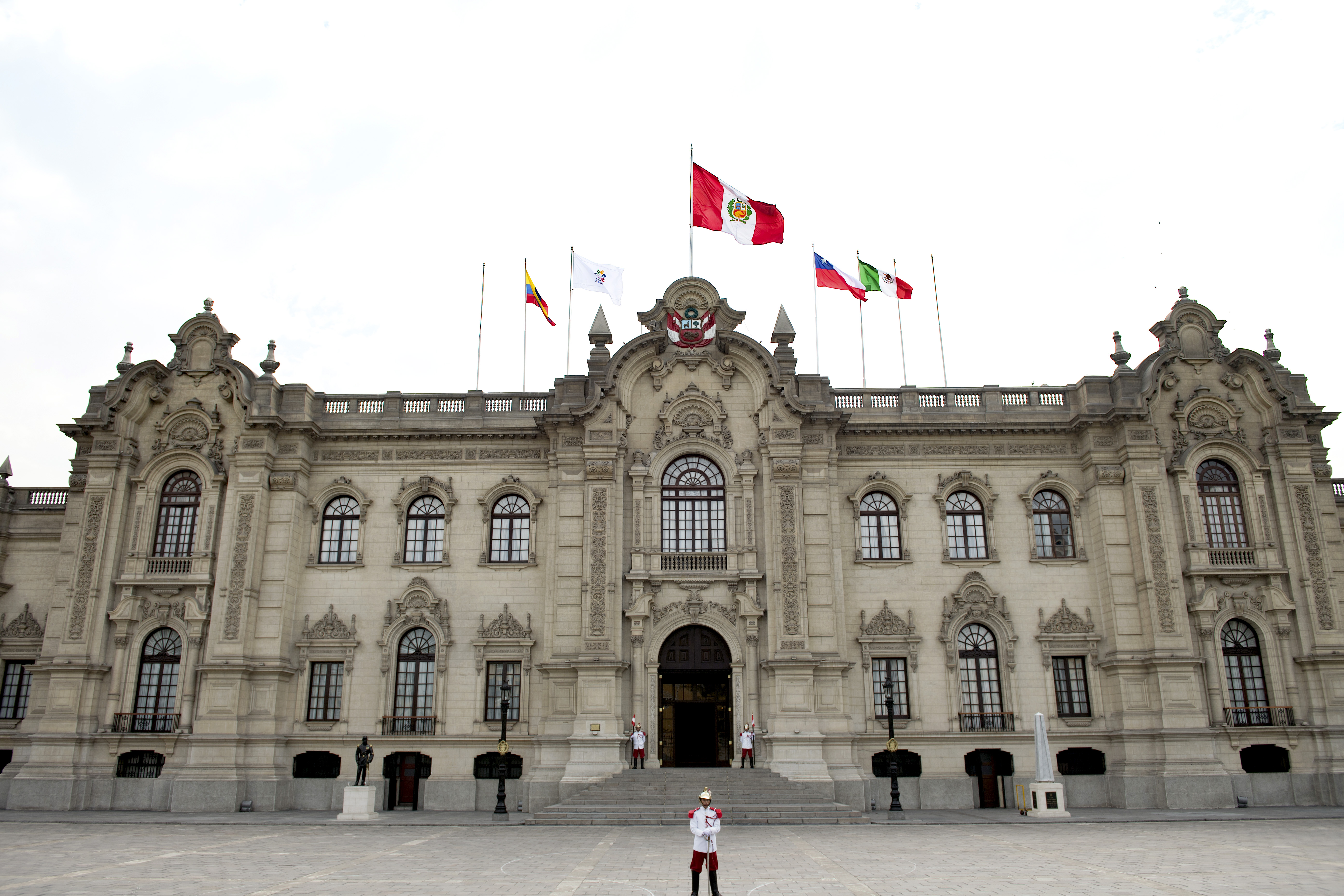 Palacio del Gobierno del Perú con las bandera de la Alianza del Pacífico, incluido sus miembros: Perú, Colombia, Chile y México